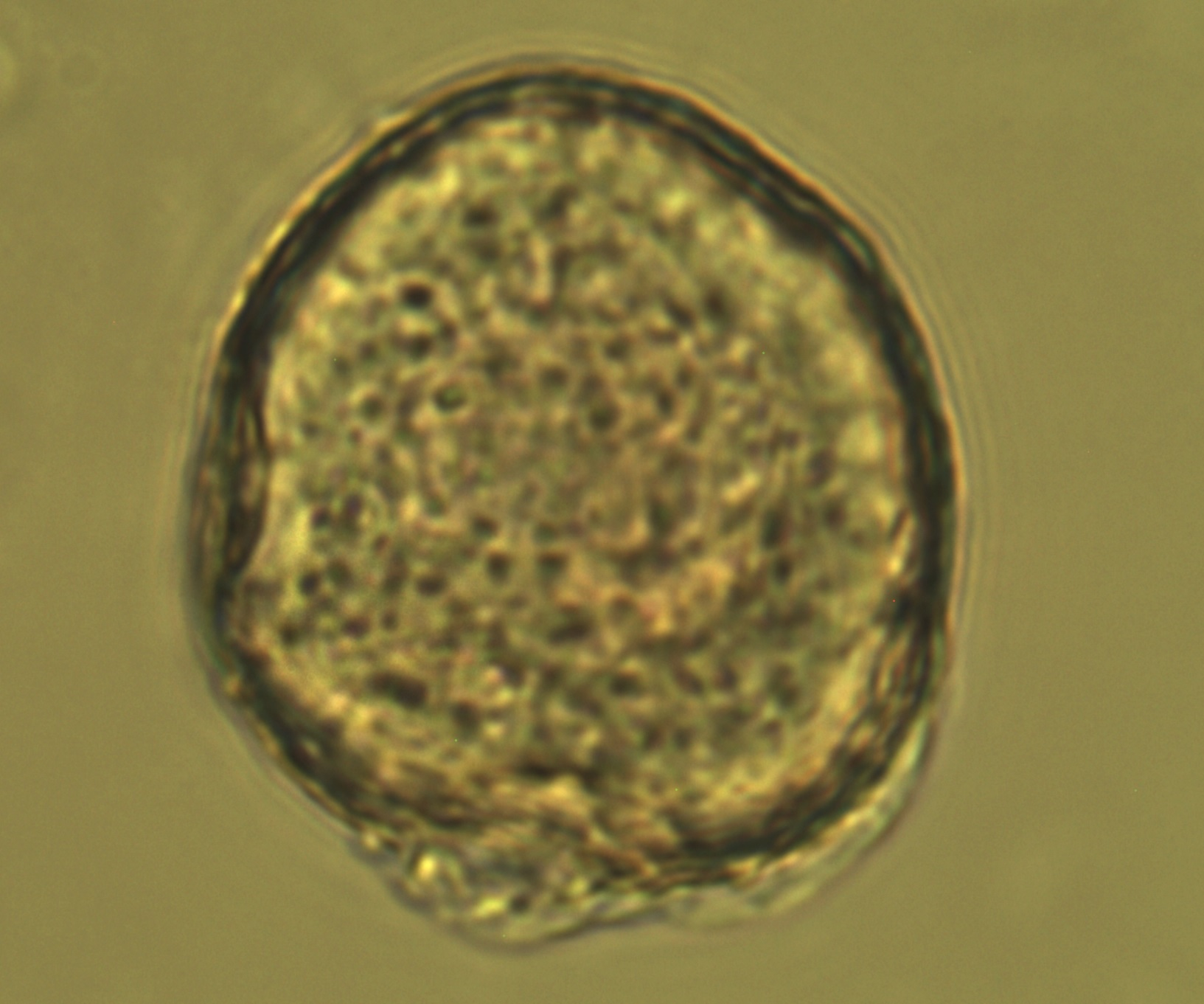 Asarum europaeum Pollenkorn 400x